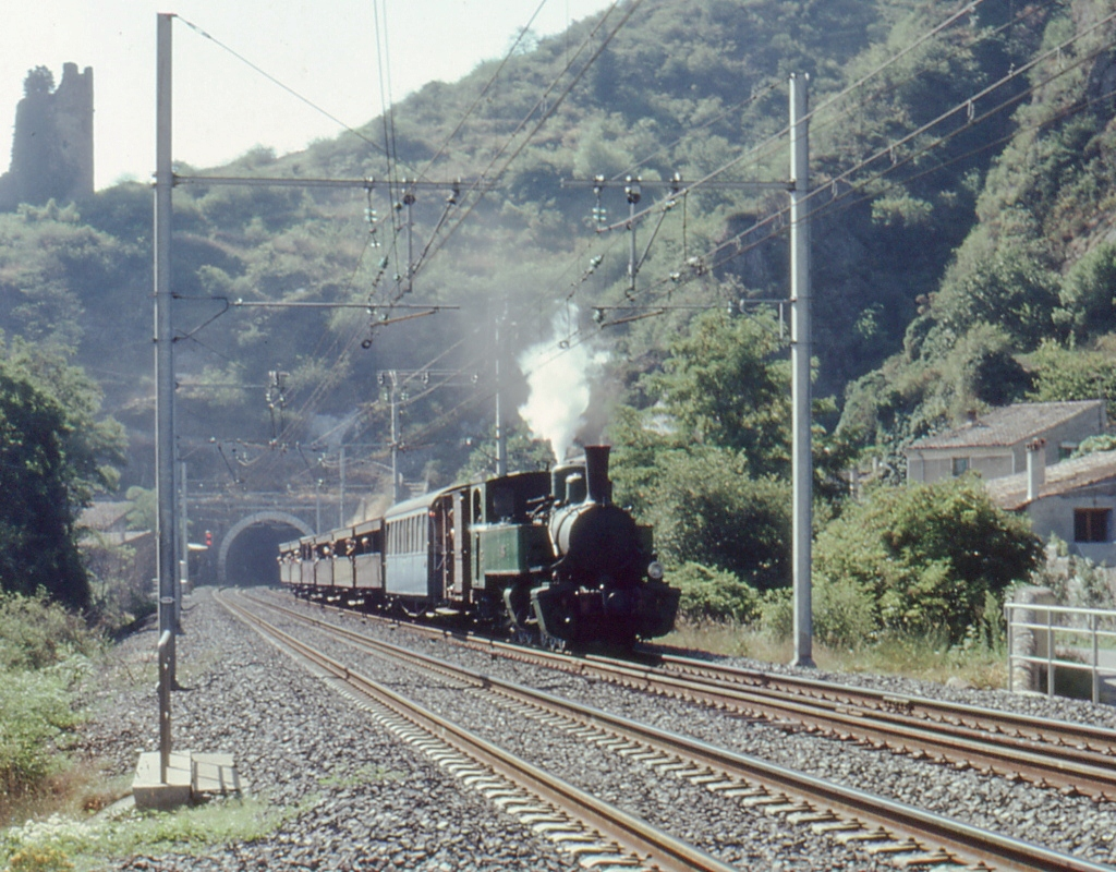 Au départ de Tournon, le Mastrou empruntant la voie à deux files de rails.